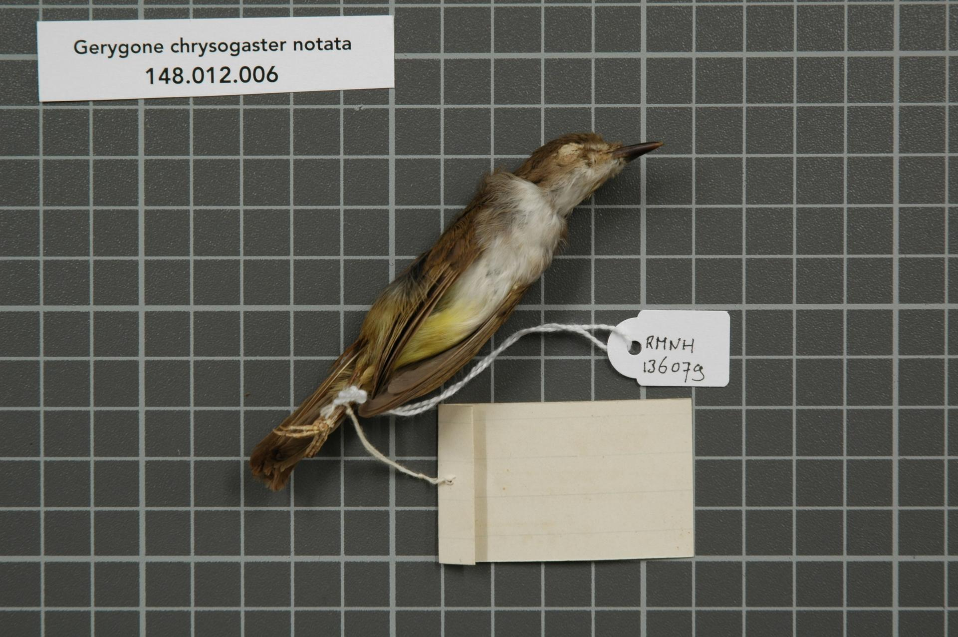 Gerygone chrysogaster notata Salvadori, 1878